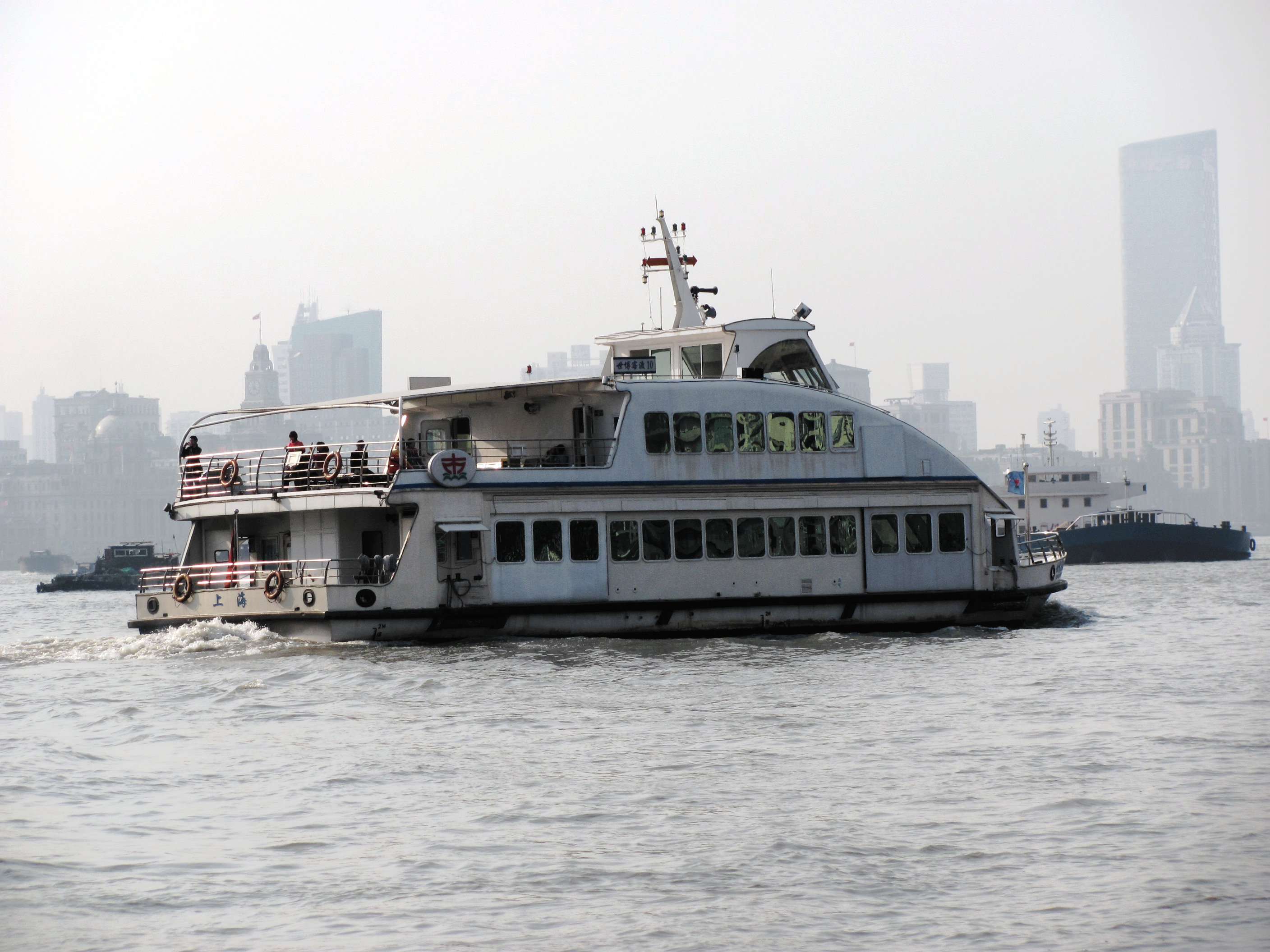 上海东复线渡轮